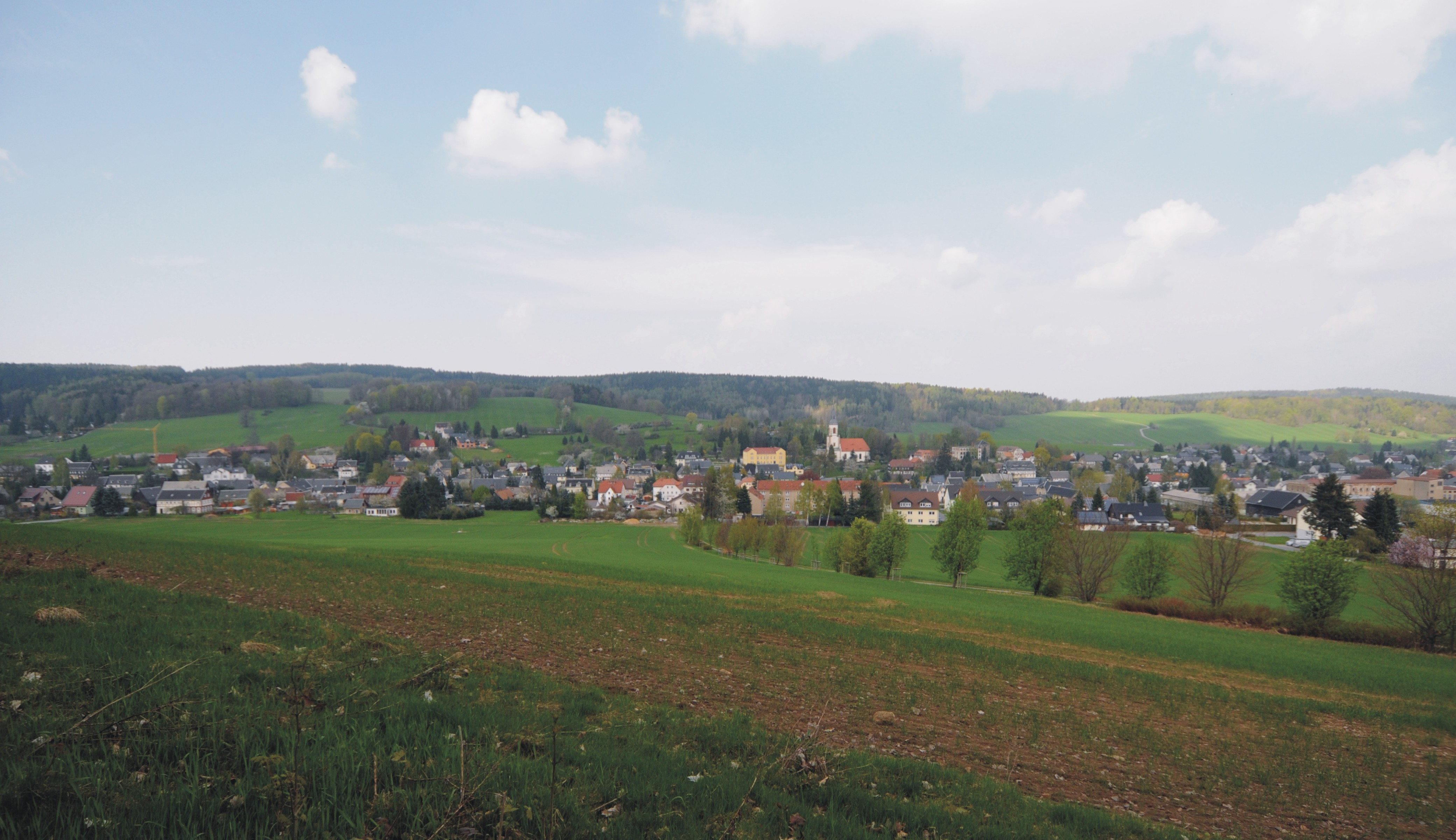 Blick auf Wehrsdorf (Sohland/Spree, Sachsen, Deutschland)